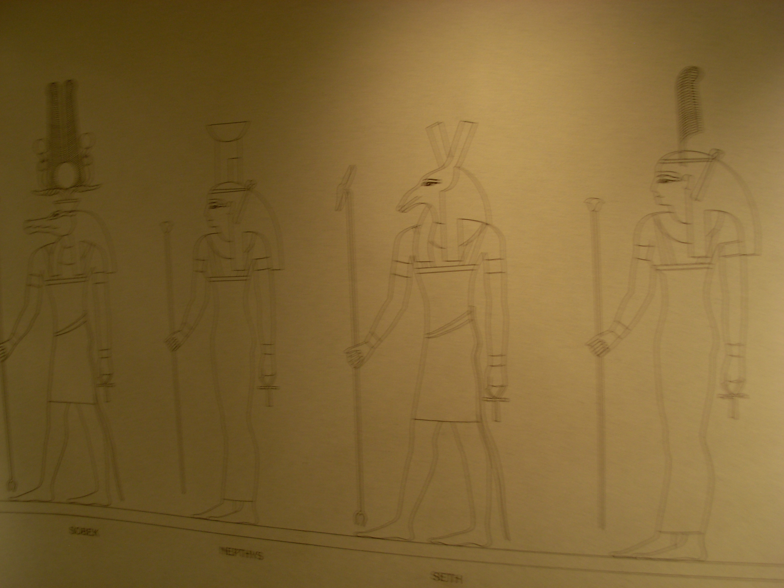 Sobek (bog-krokodil), Neftida (Setova žena), Set i Ma'at ("red").